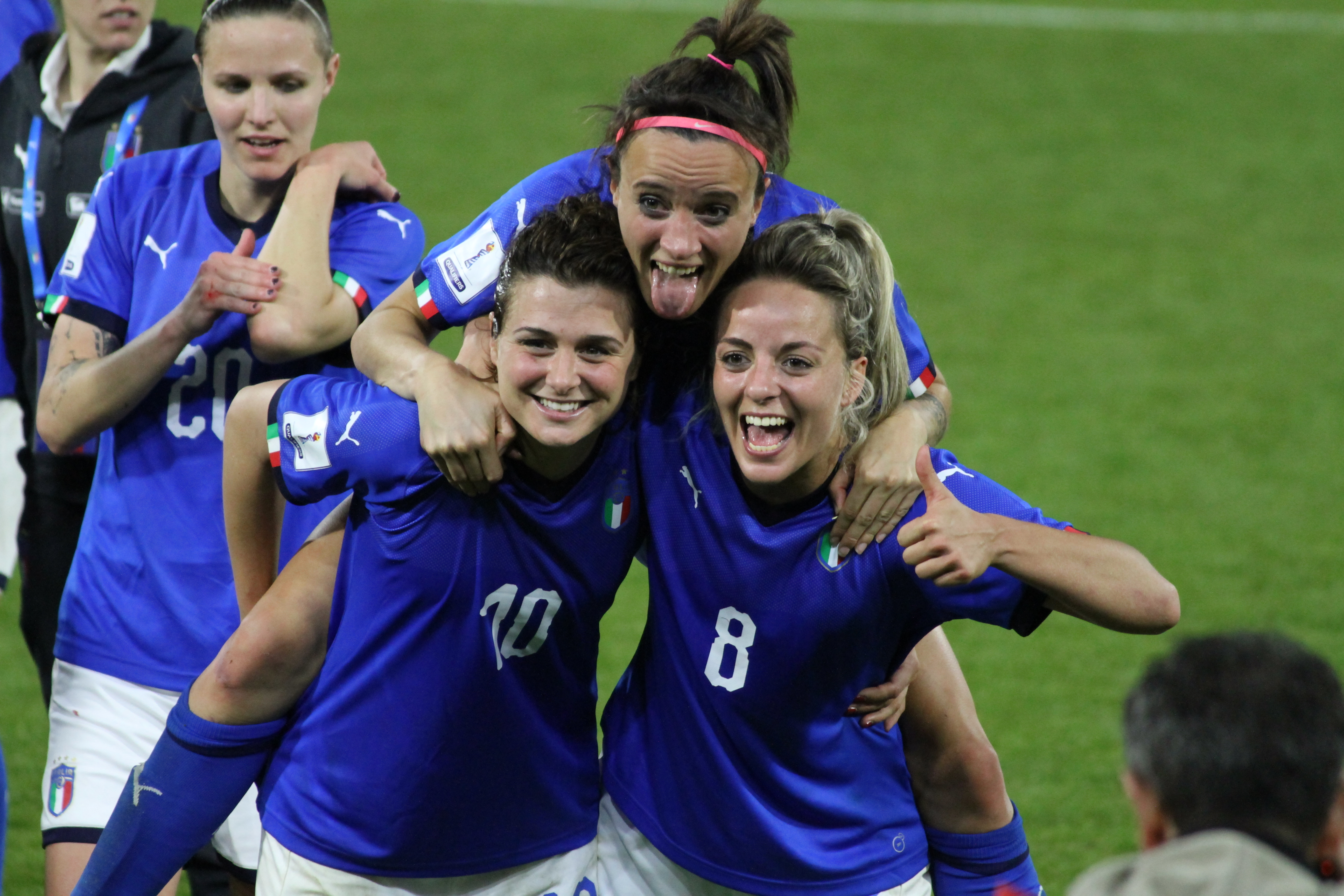 Ferrara, 10 aprile 2018: Italia vs Belgio, qualificazioni al Mondiale di Francia 2019, festeggiamento della nazionale italiana a fine partita.